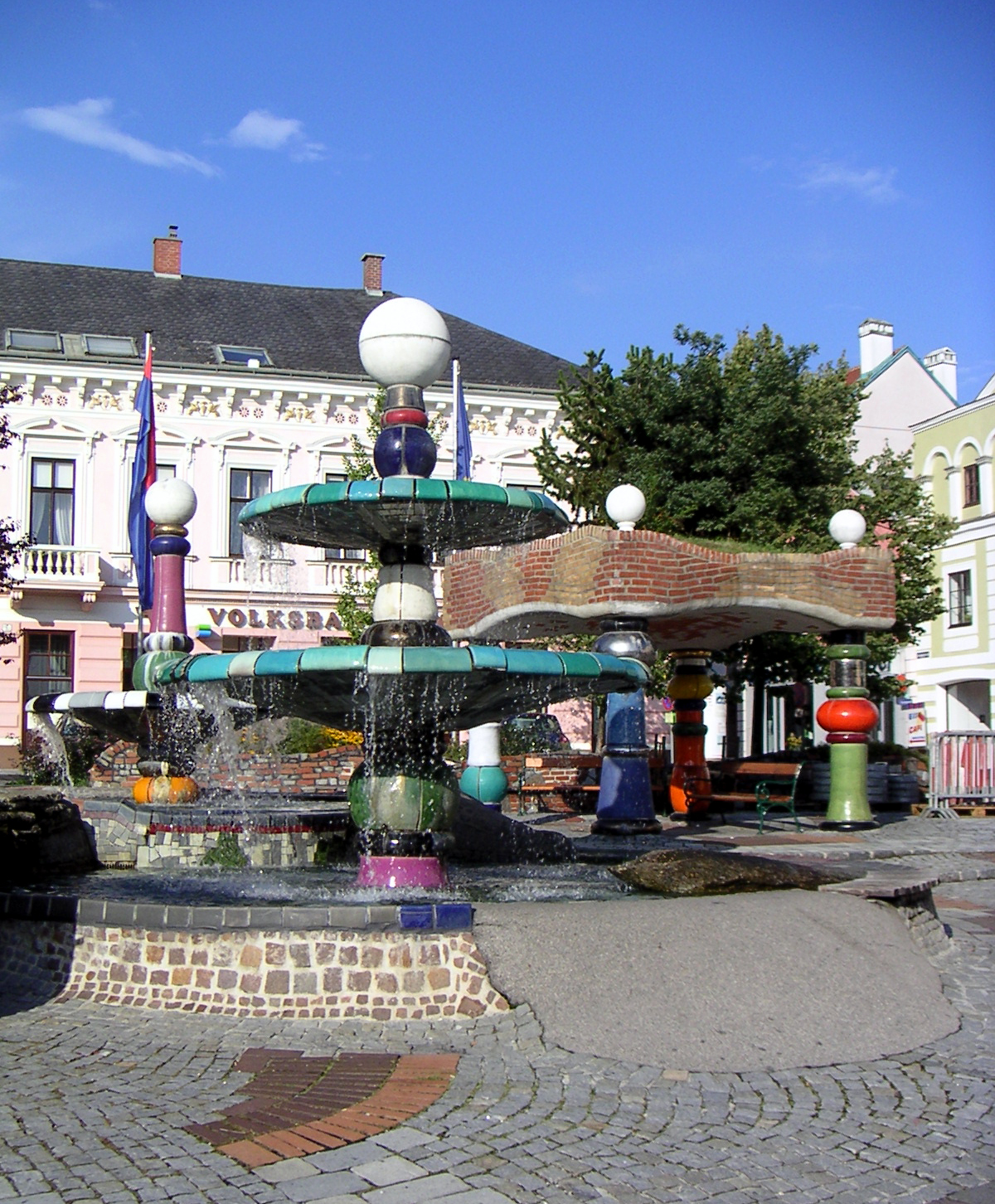 Hundertwasserbrunnen in Zwettl, selbst fotografiert